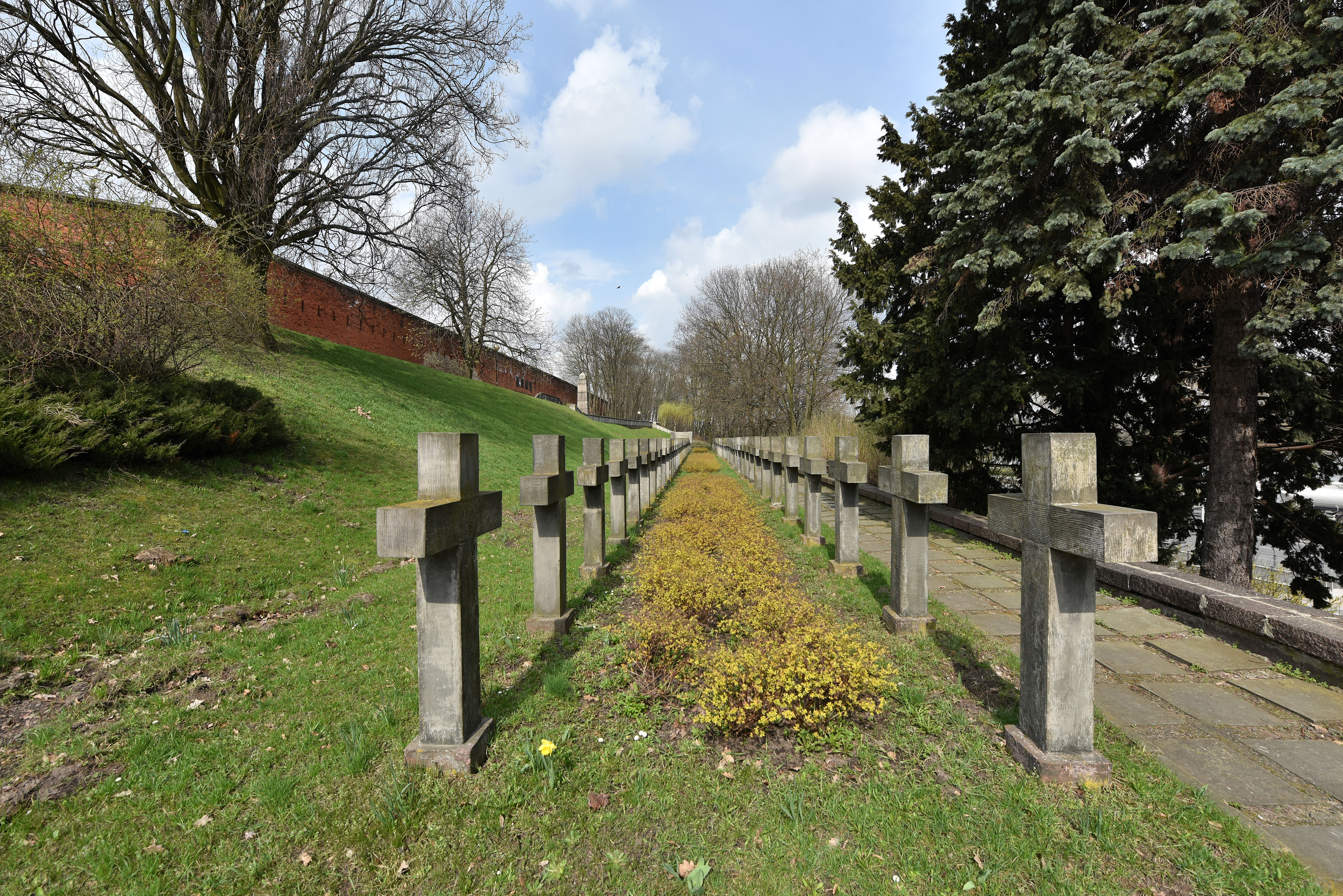 Symboliczny cmentarz na stokach Cytadeli Warszawskiej